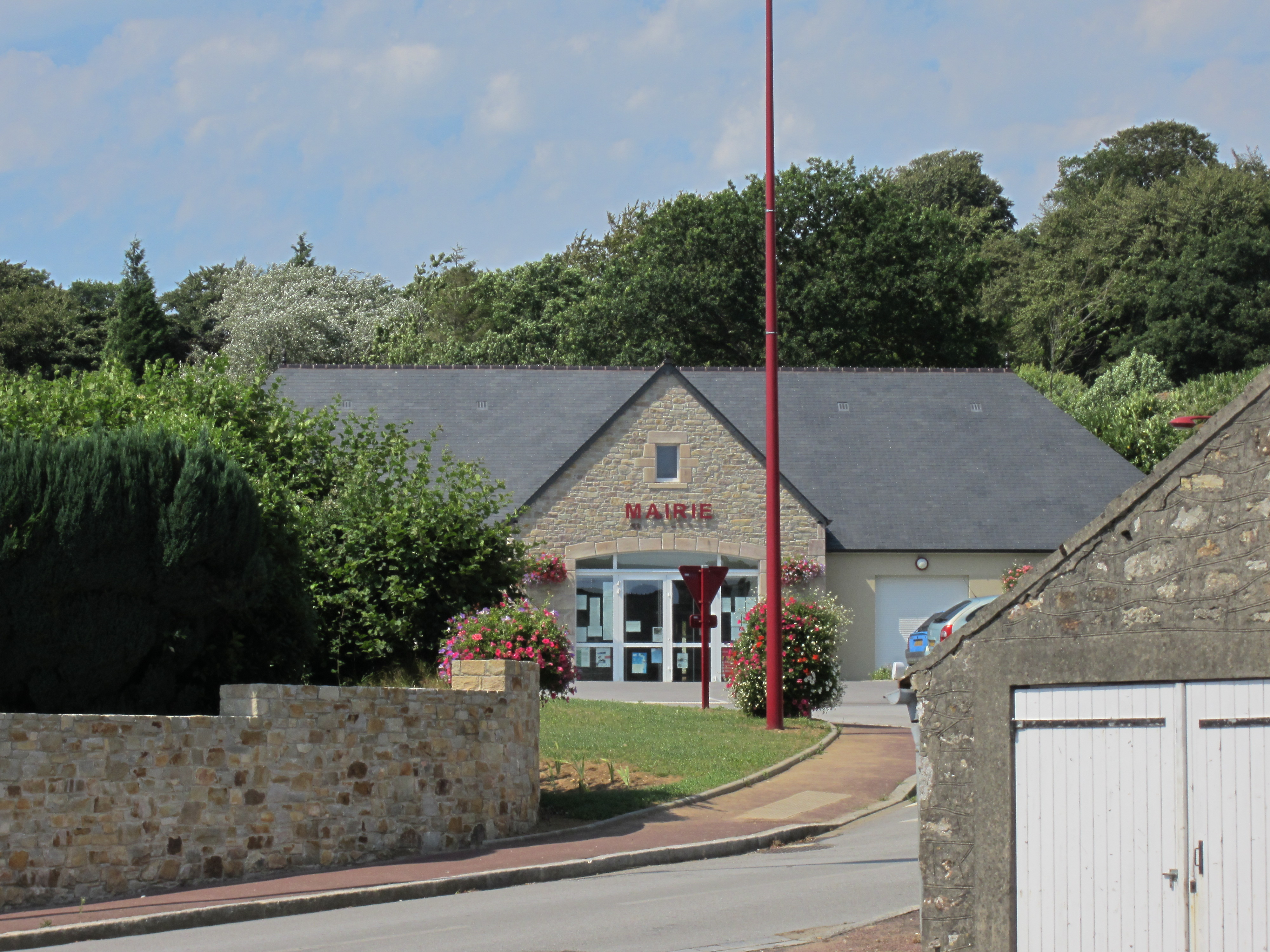 Mairie d'Hardinvast, Manche